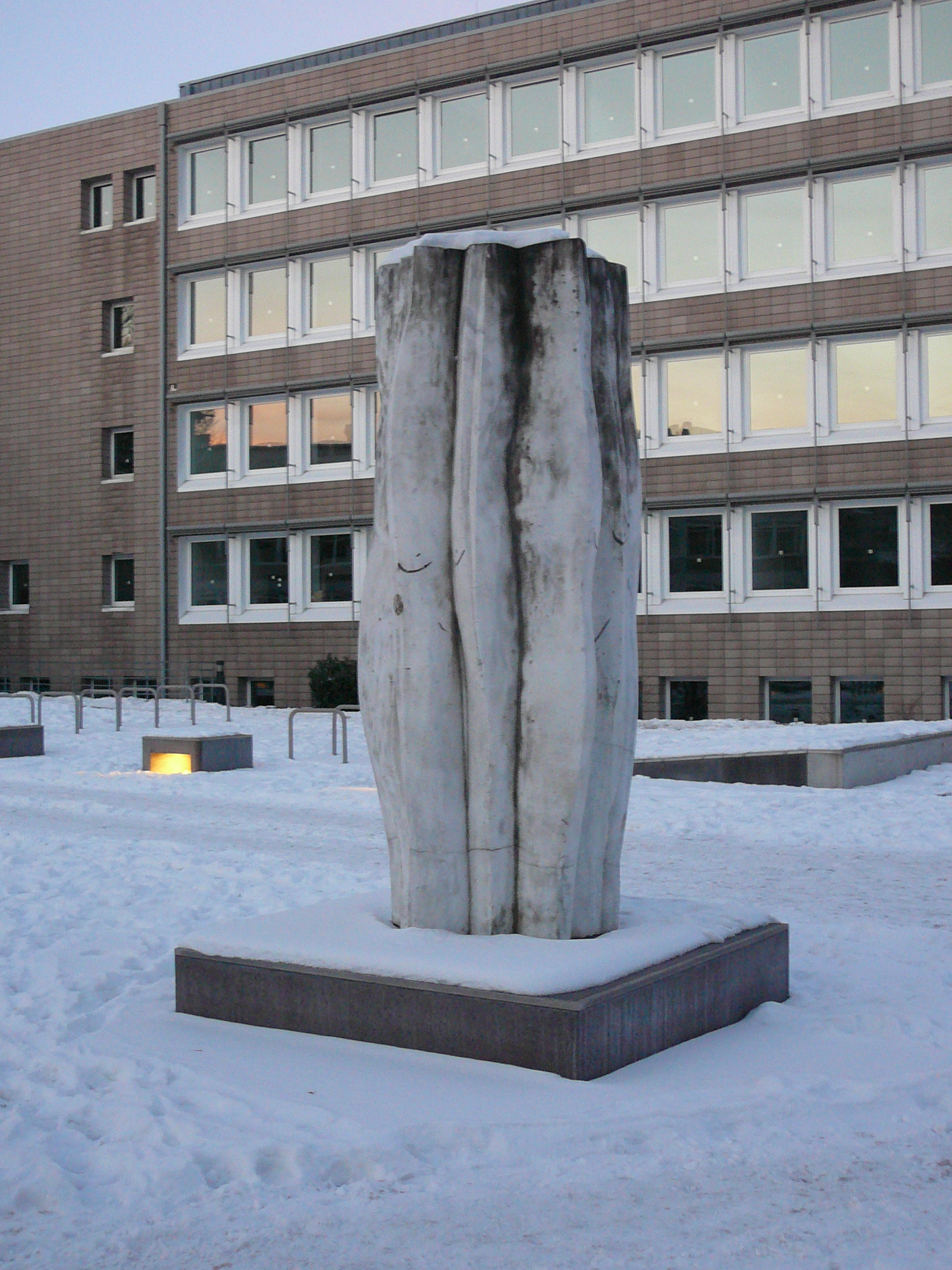 Haspelerstraße, Wuppertal